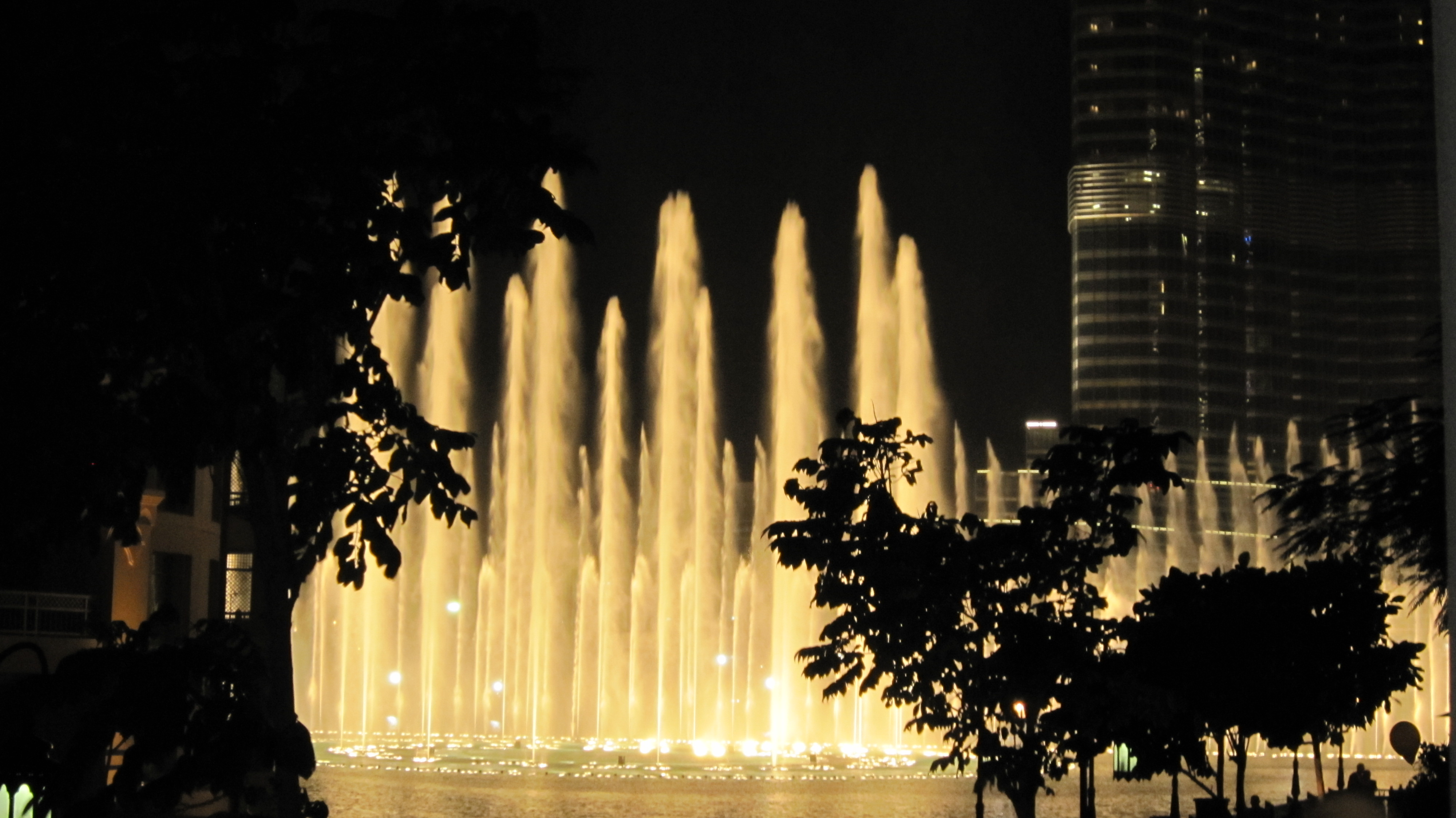 Burj Dubai